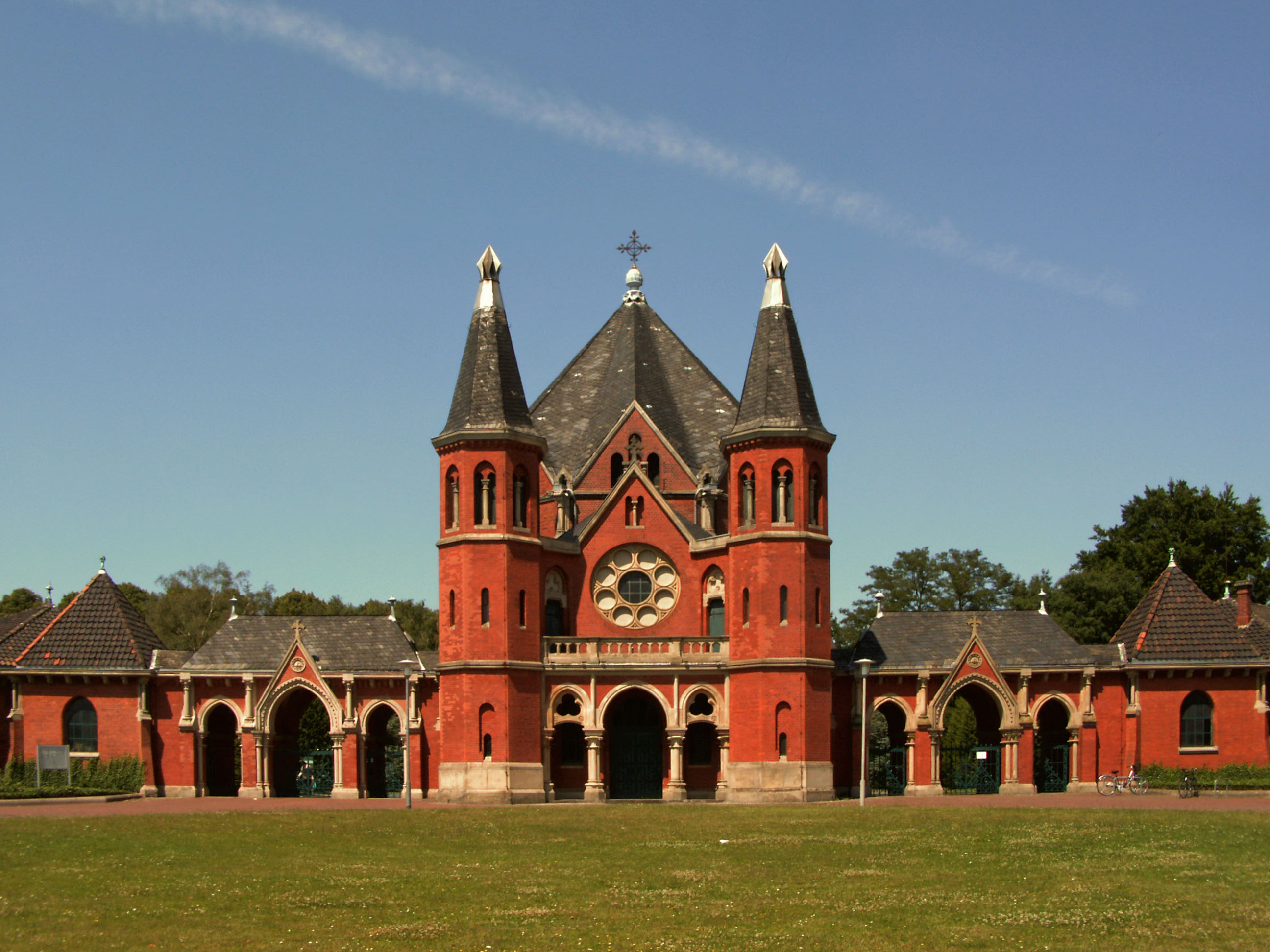 Eingang des Friedhofes in Hannover, Stadtteil Stöcken.